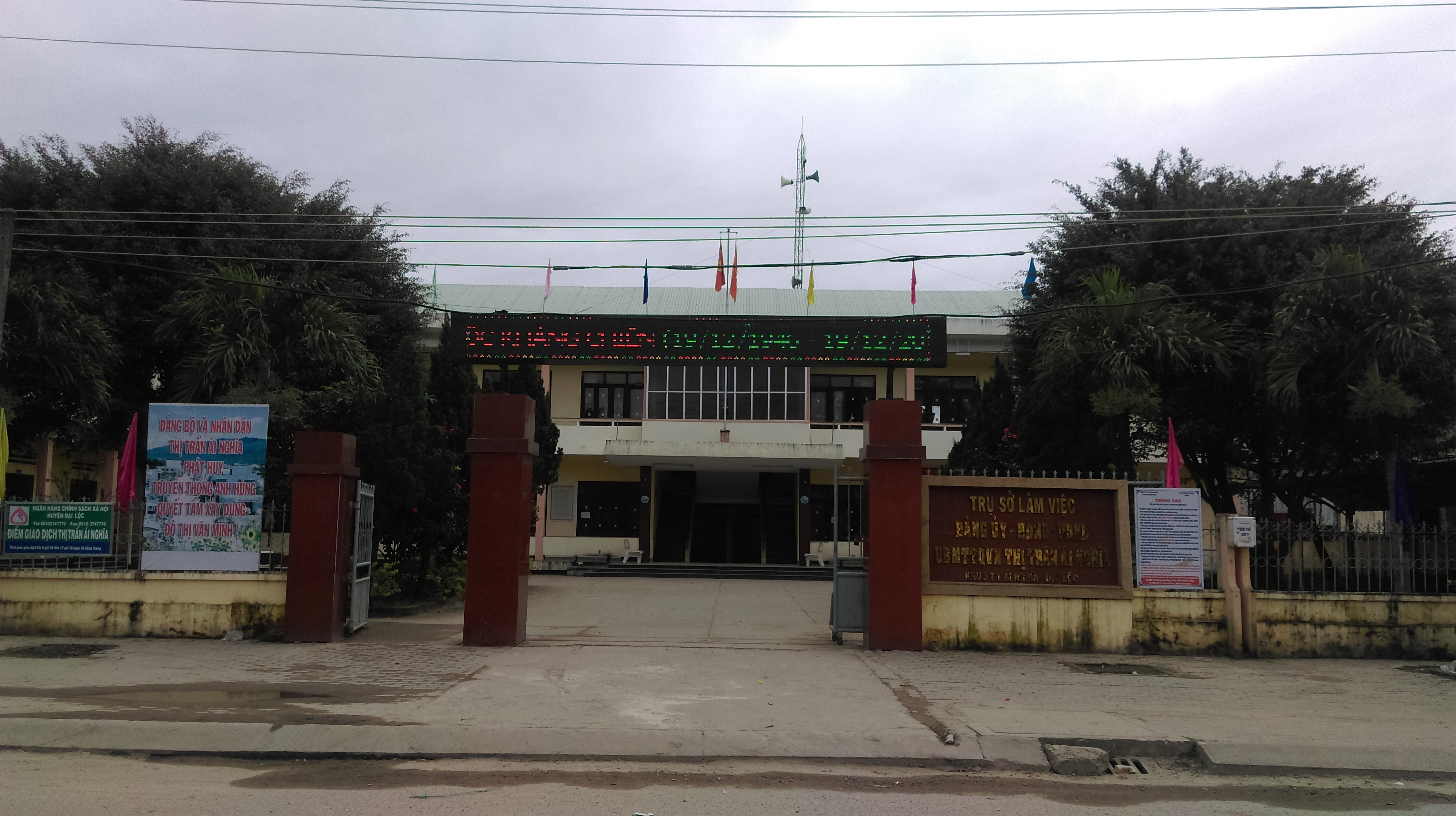 UBND thị trấn Ái Nghĩa, Đại Lộc, Quảng Nam